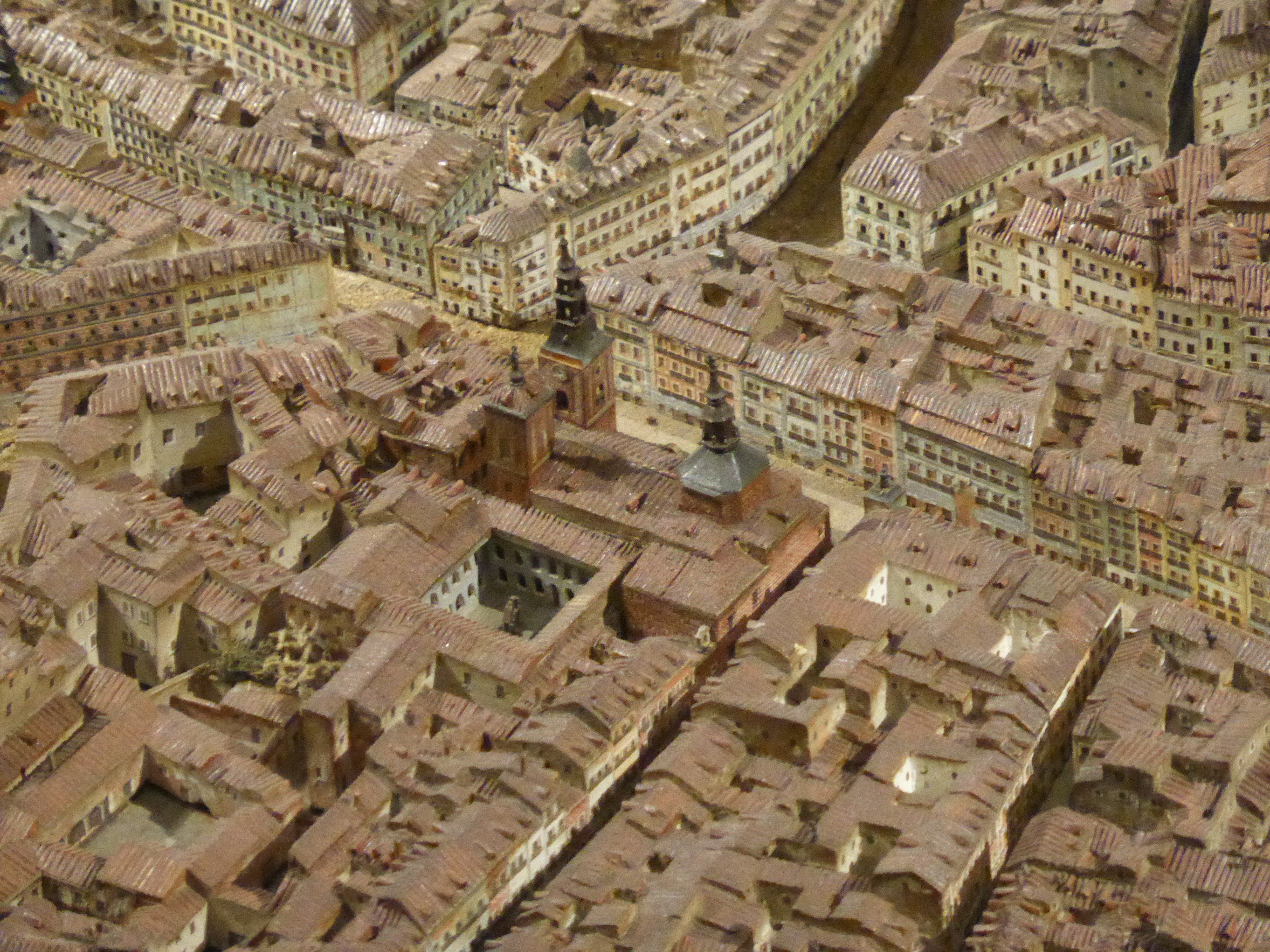 La gran maqueta de Madrid construida entre los años 1828 y 1830, por León Gil de Palacio, incluye el antiguo convento de la Trinidad, luego Museo de la Trinidad, de la calle Atocha de Madrid. Esta maqueta se conserva en el "Museo de Historia de Madrid", antes llamado "Museo Municipal de Madrid".